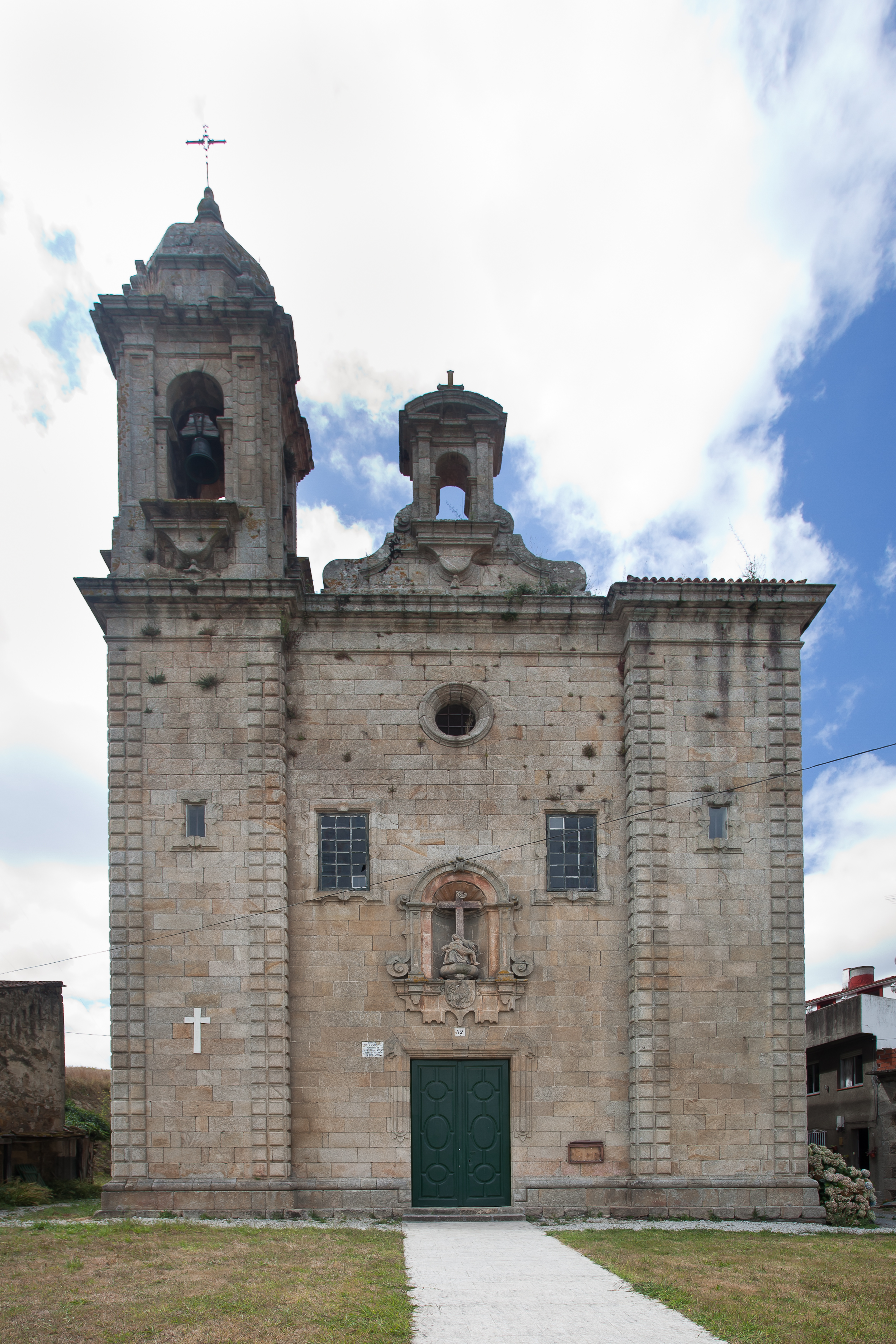 Santuario da Angustia, San Pedro das Viñas, Betanzos, Galiza